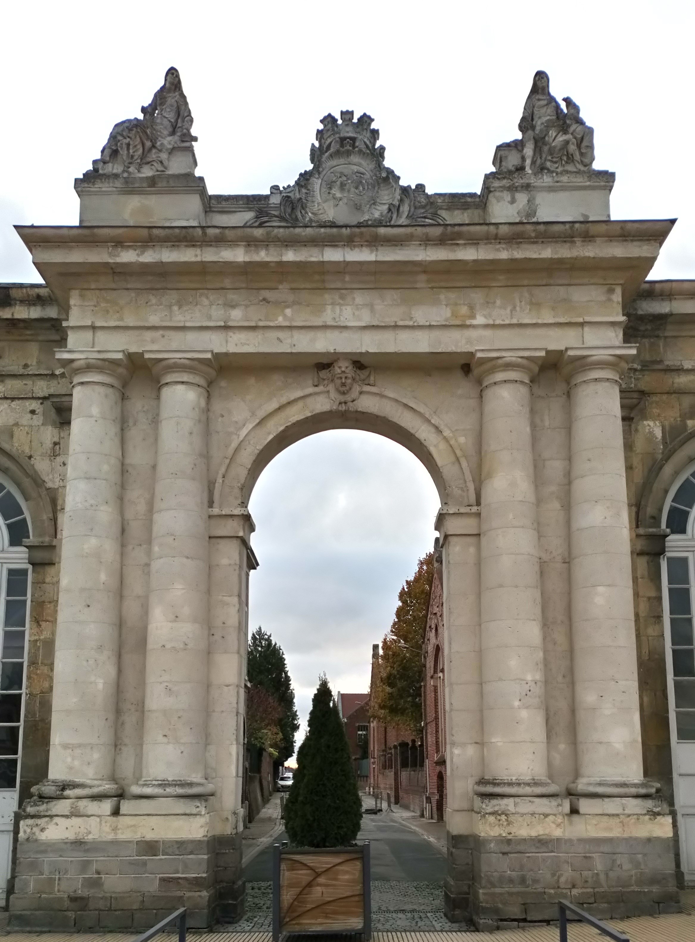 Porte d'entrée de l'abbaye 1